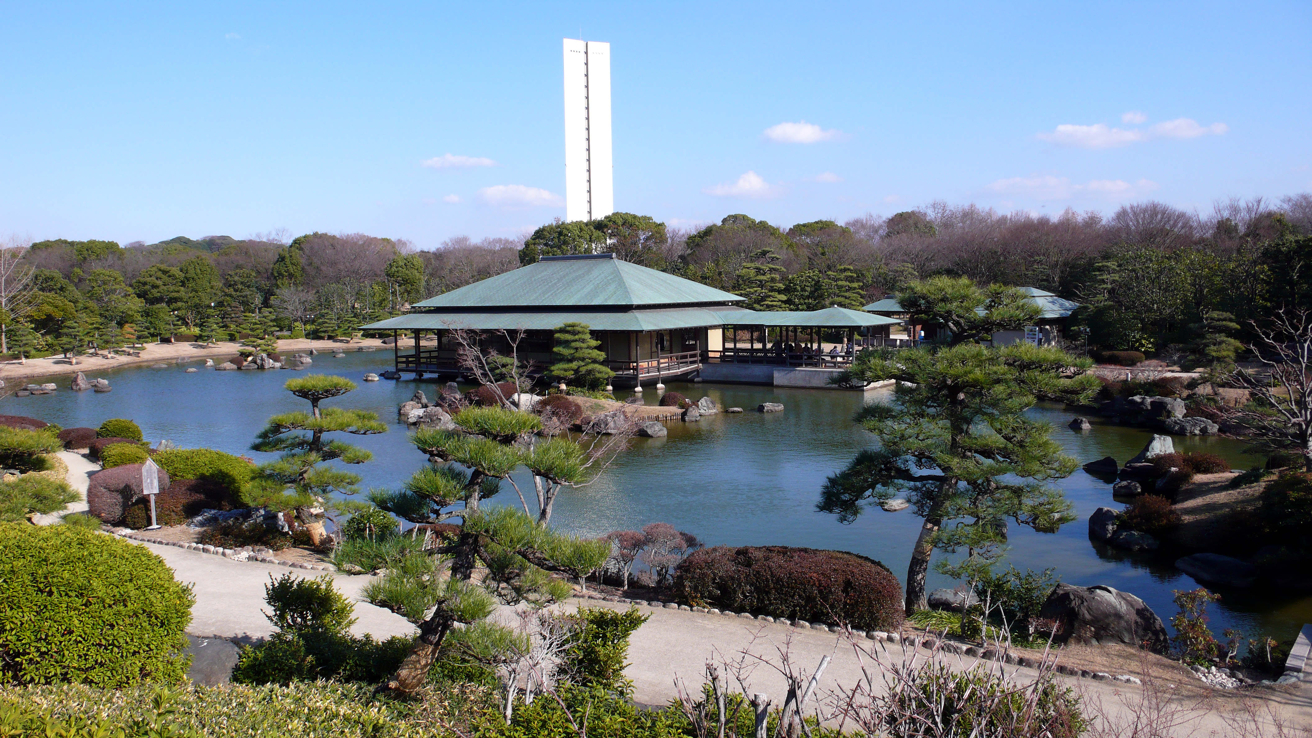 Daisen-park (大仙公園), Sakai, Osaka, Japan